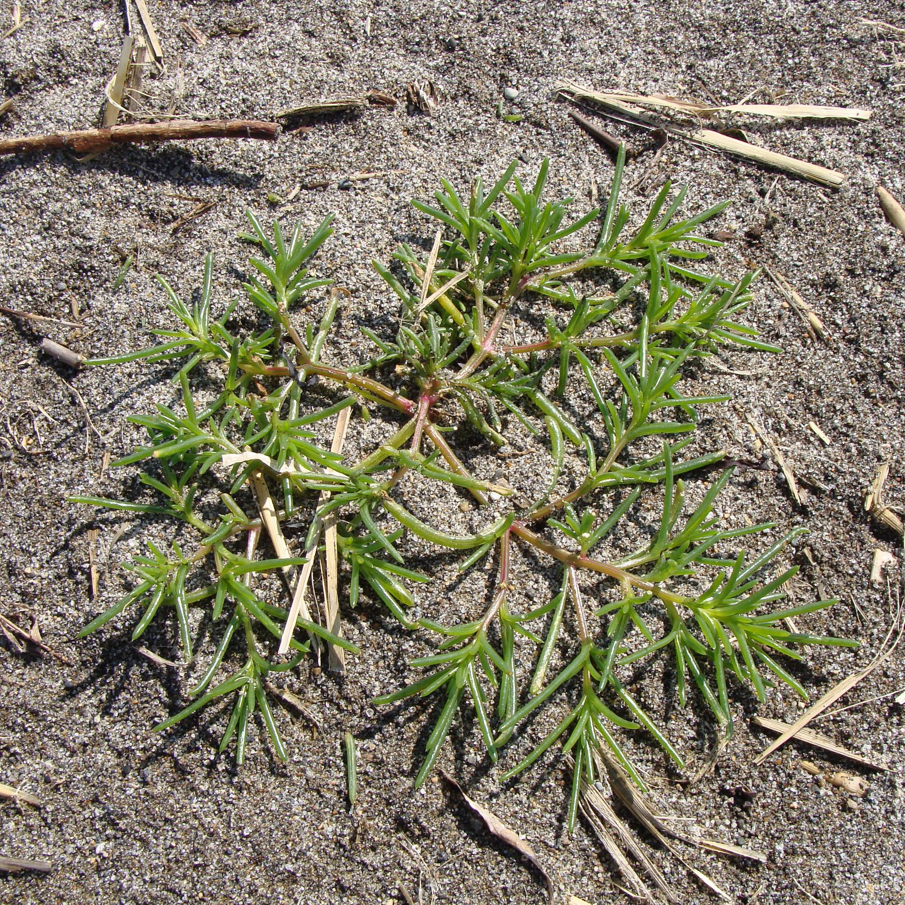 Kali komarovii (Iljin) Akhani & E. H. Roalson, (Syn.: Salsola komarovii Iljin) Aomori, Japan